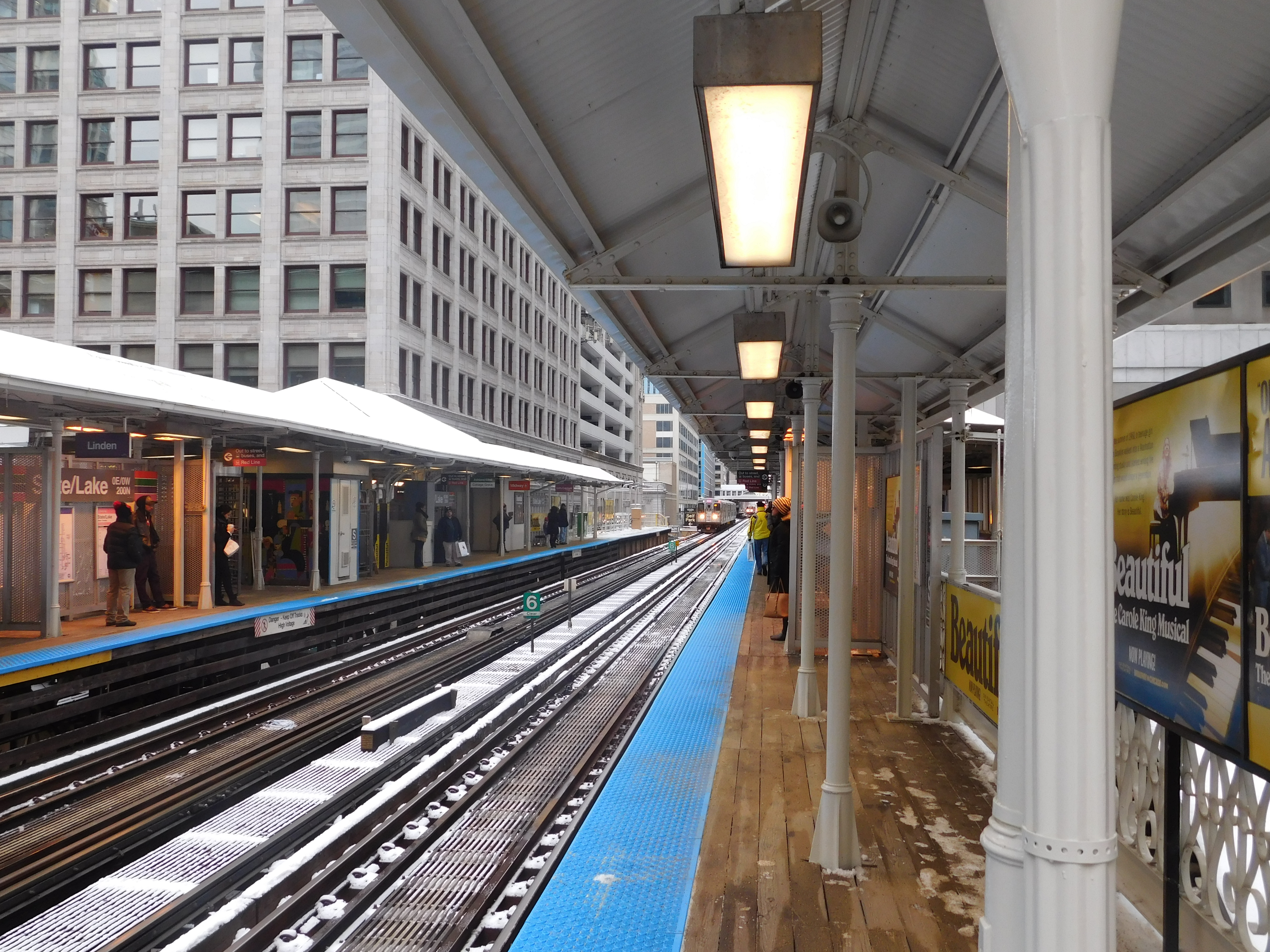 Chicago, Illinois